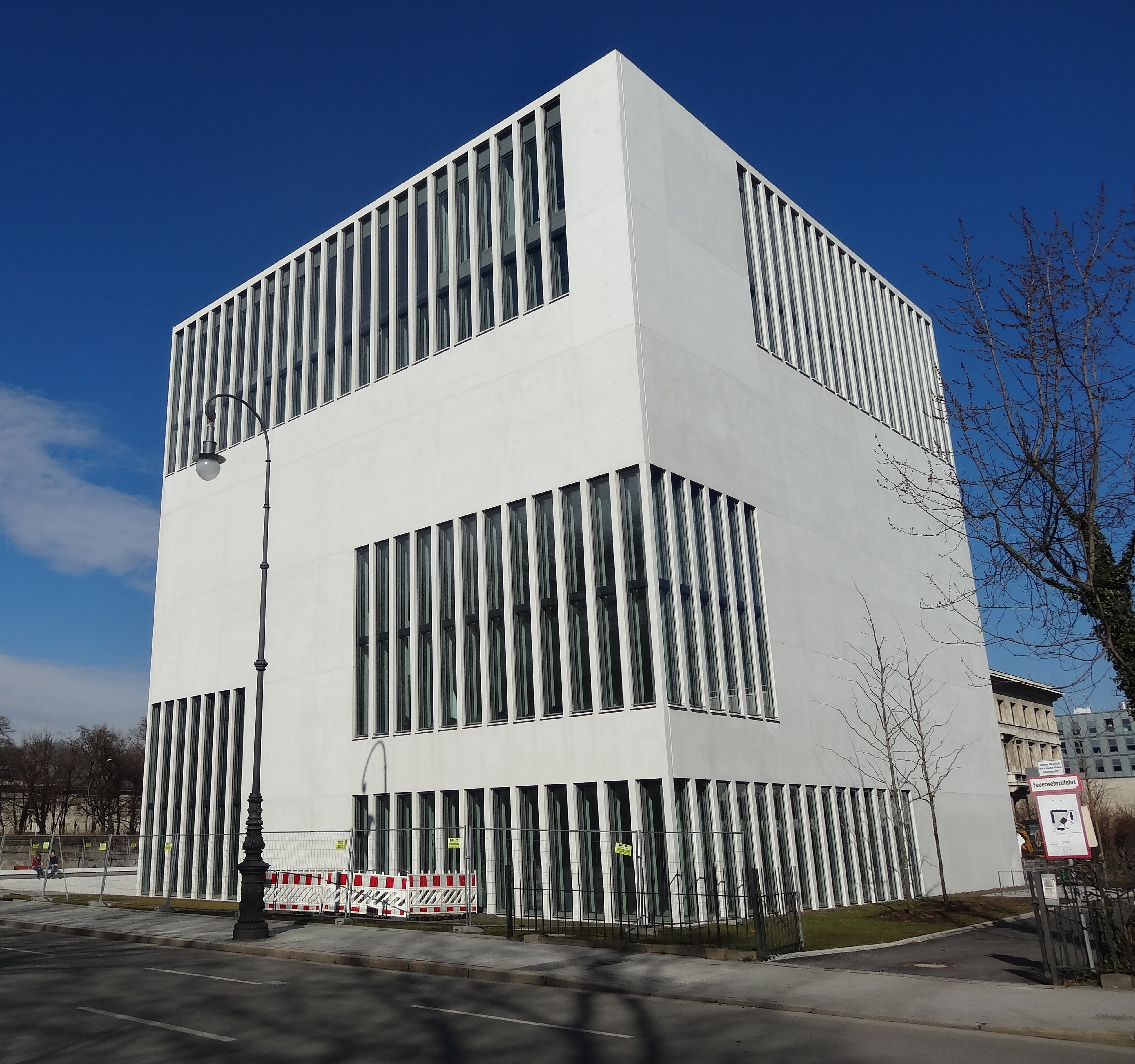 Das neu gebaute NS-Dokumentationszentrum am Münchner Königsplatz